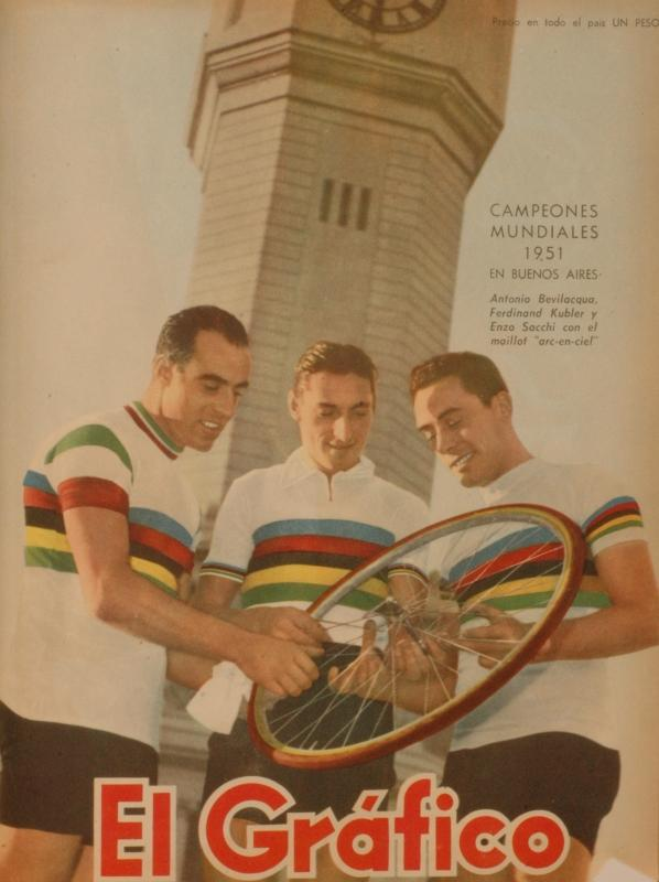 Coberta de la revista "El Gráfico": Antonio Bevilacqua (esquerra), Ferdinand Kubler (centre) y Enzo Sacchi (dreta) - 1951